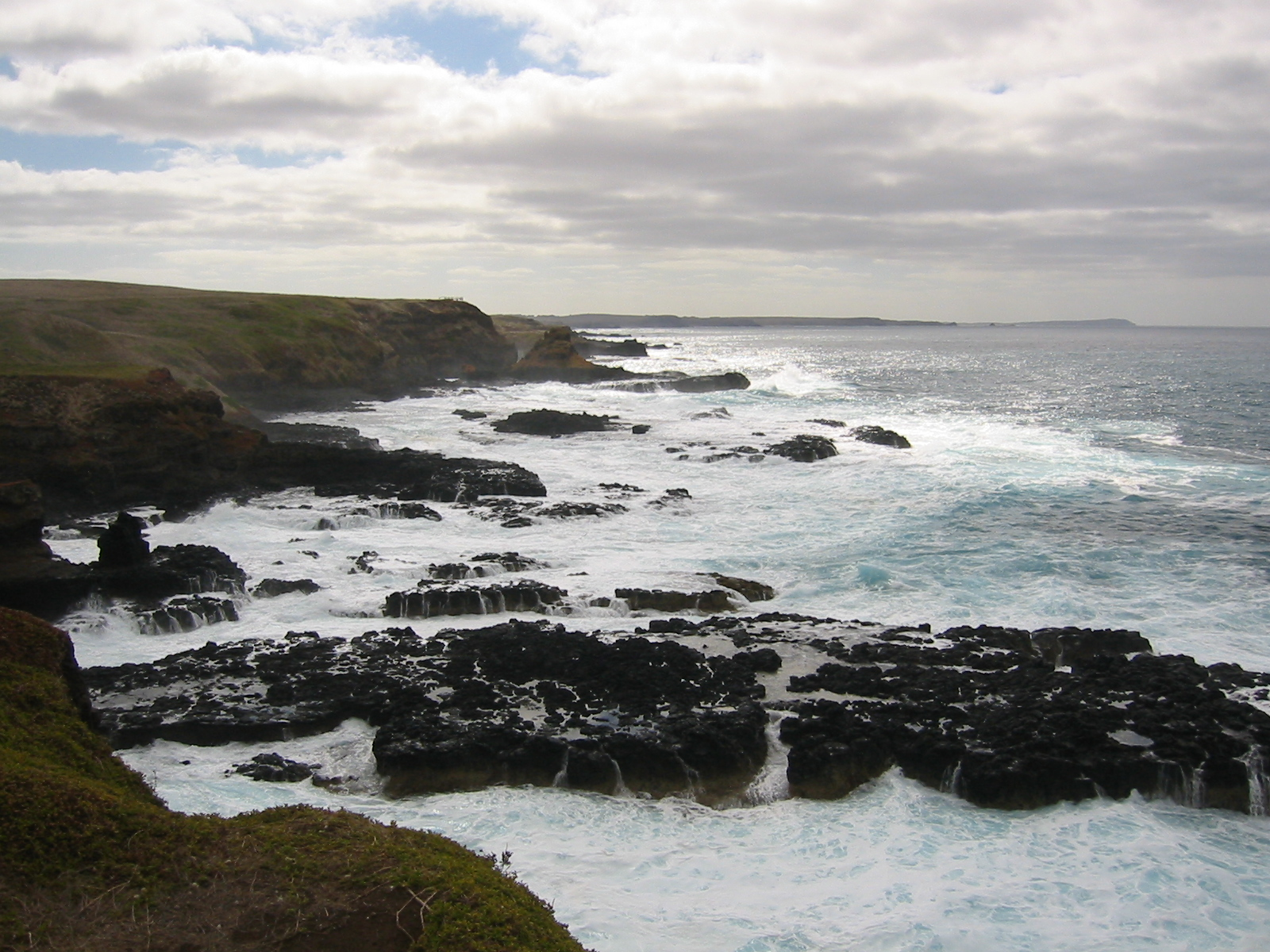 Rauhe Küste im Westen von Phillip Island